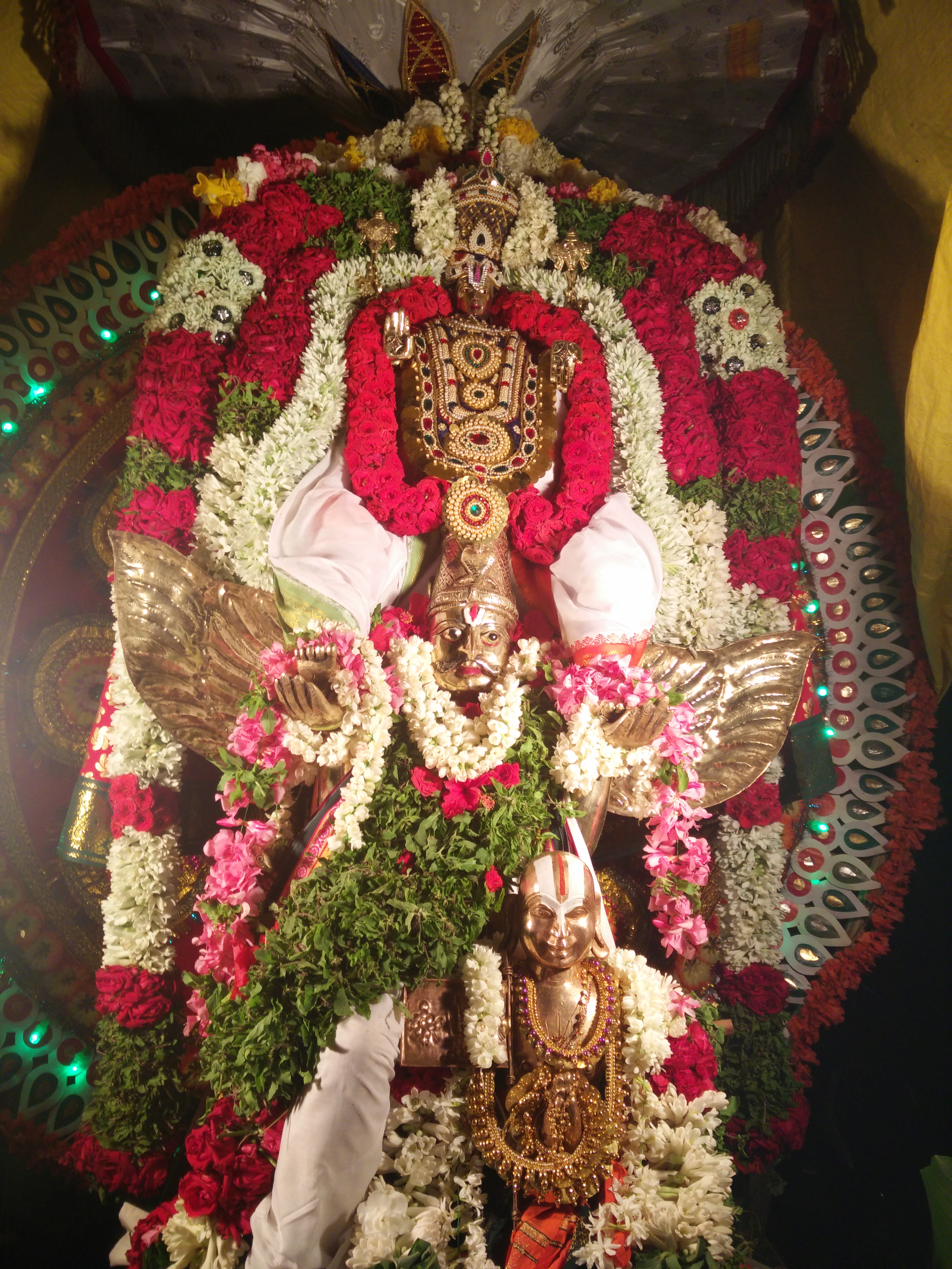 ஊத்தங்கரை பூதேவி சமேத ஸ்ரீ வெங்கடரமண சுவாமி